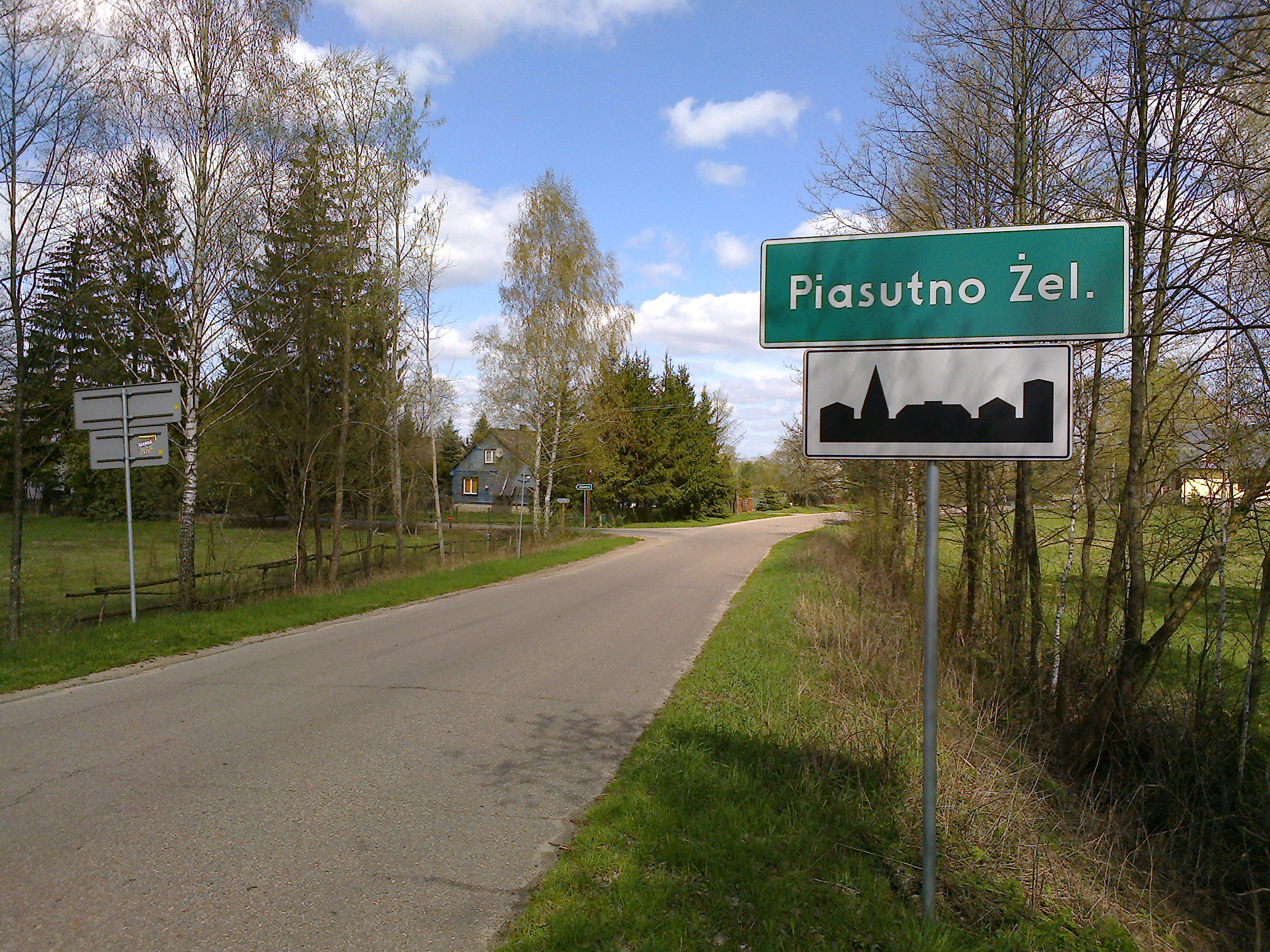 Piasutno Żelazne (powiat łomżyński)